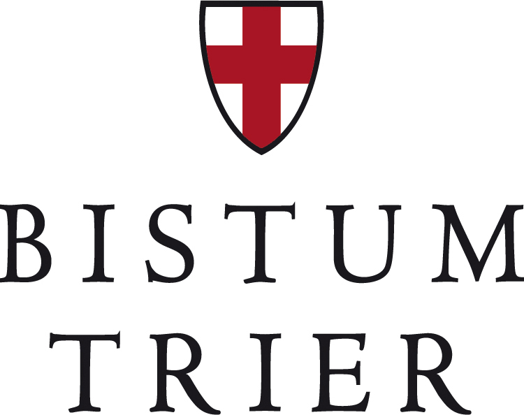 Wappen des Bistums Trier